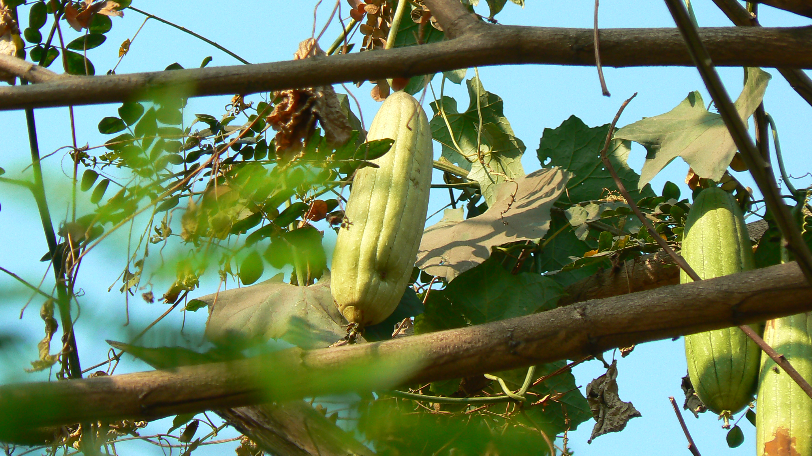 Luffa aegyptiaca